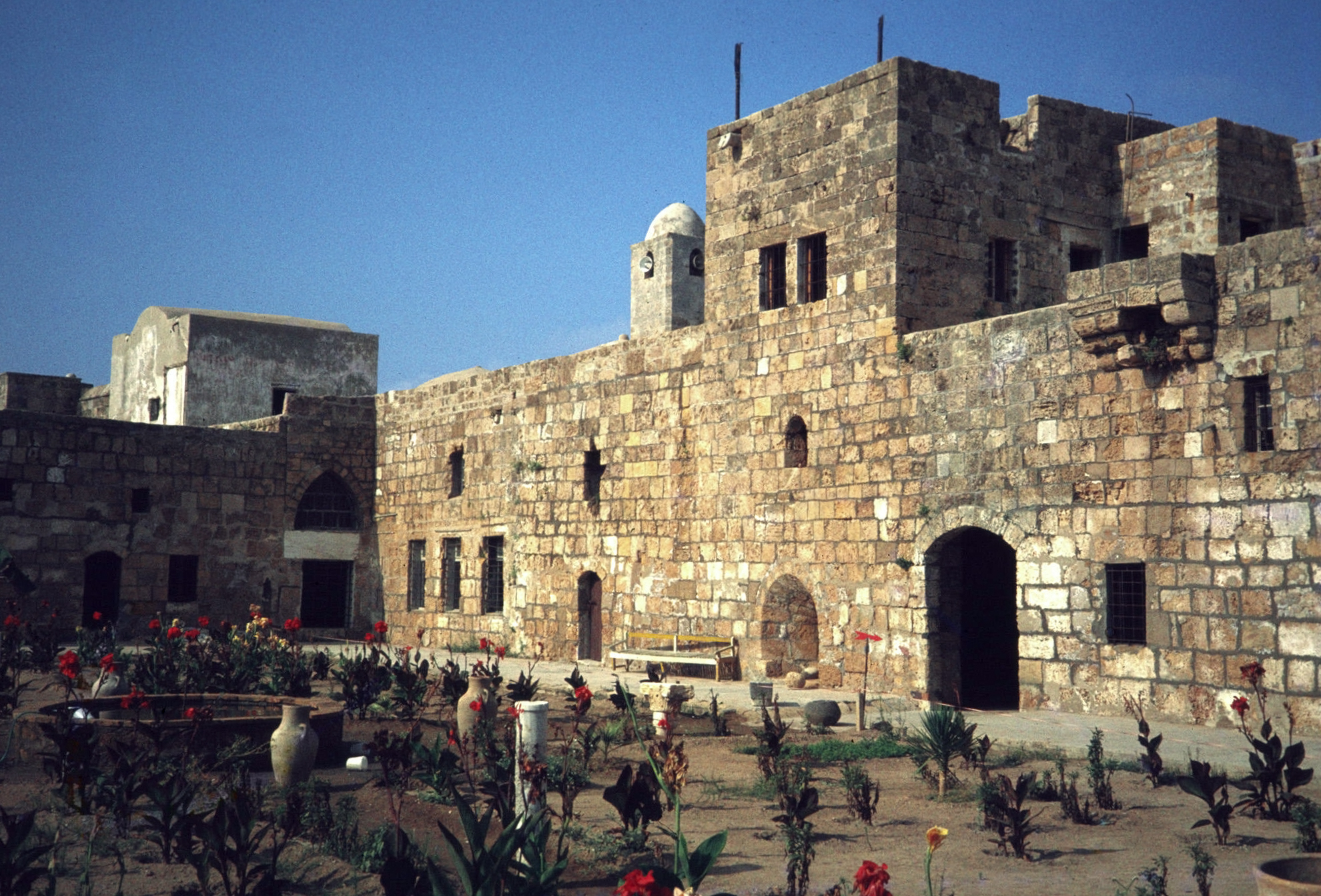 La forteresse ottomane de l'île d'Arouad (Syrie), A servi un temps de prison pendant le mandat Français en 1920.